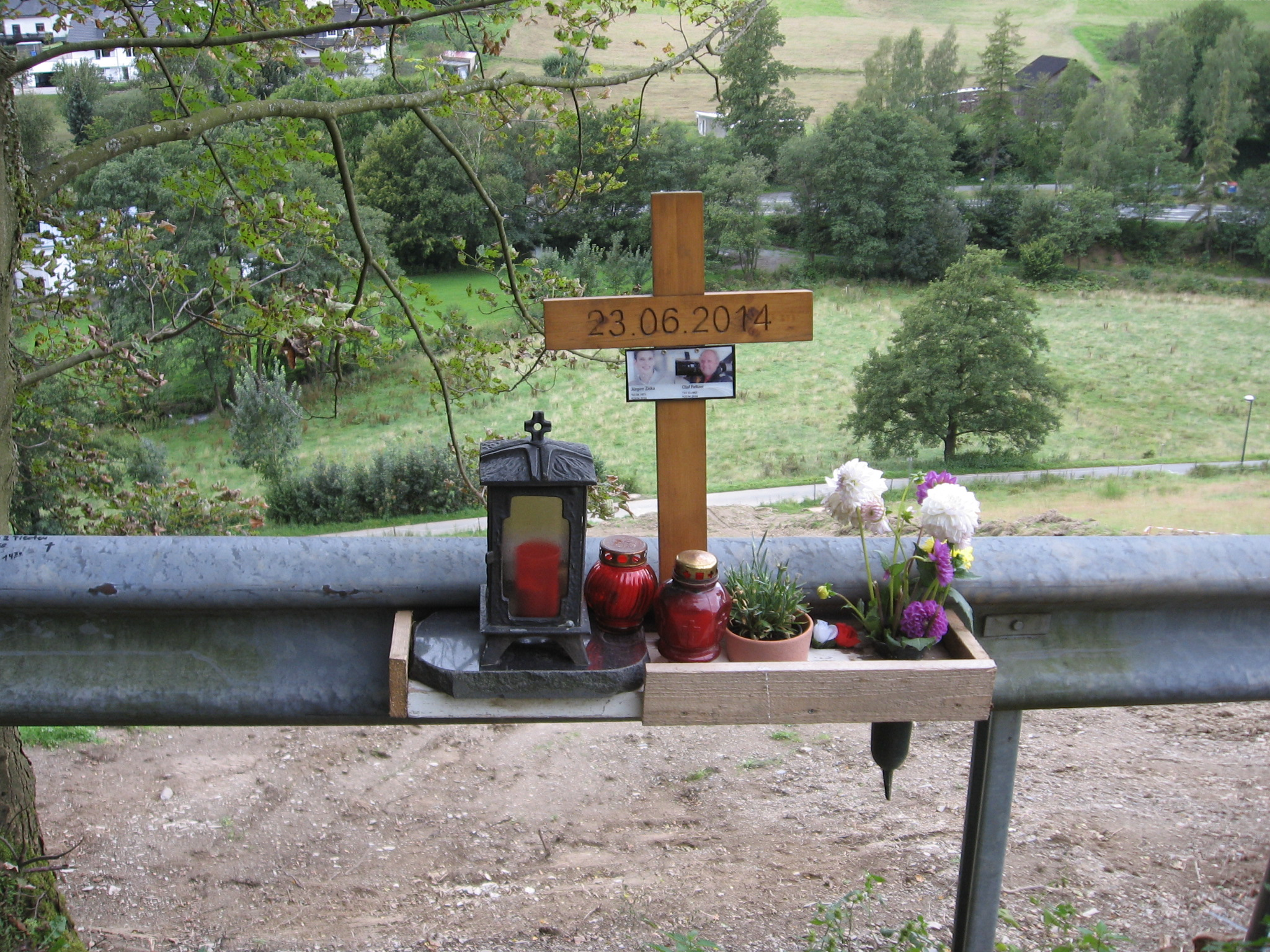 Kreuz oberhalb der Einschlagstelle des Hauptteil des Learjets bei Elpe